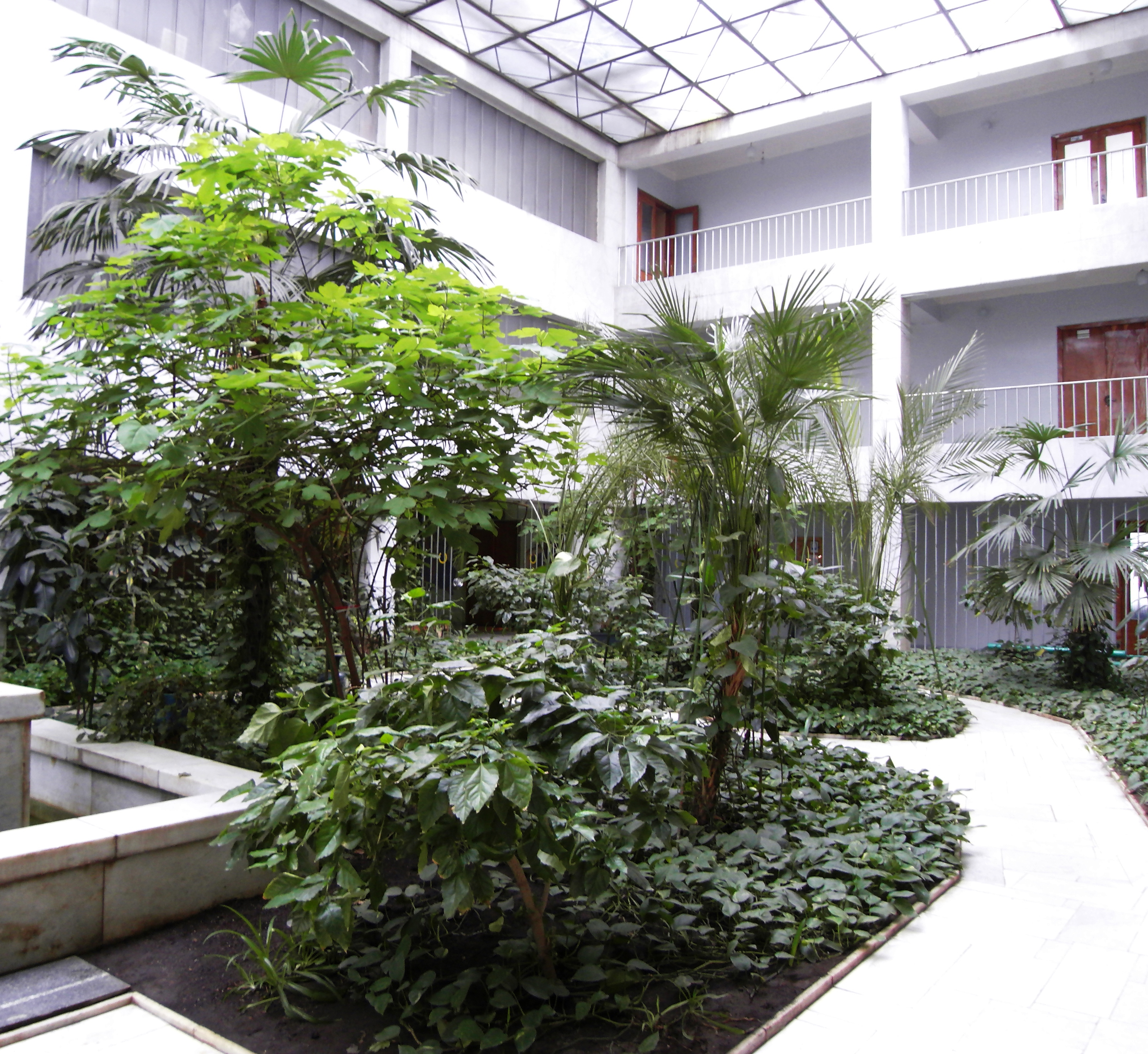 Зимовий сад палацу "Україна", Торецьк